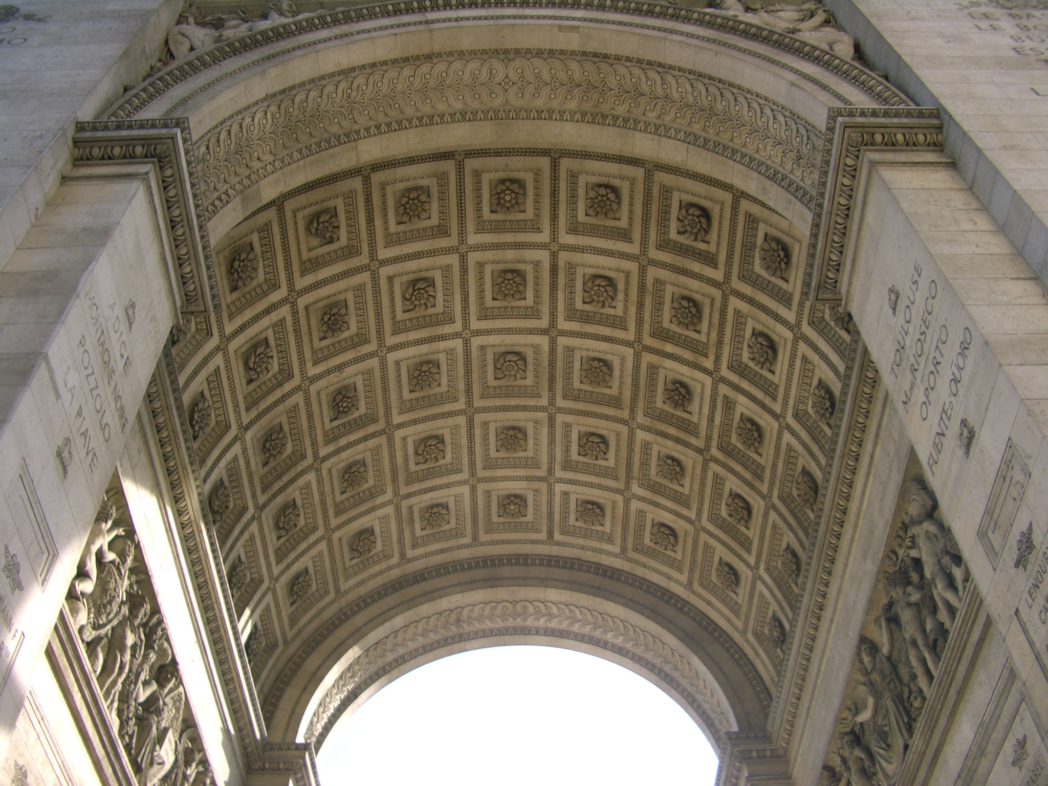 Foto, tomada el viernes 30 de septiembre de 2005, del interior del Arco del Triunfo, en París, Francia.